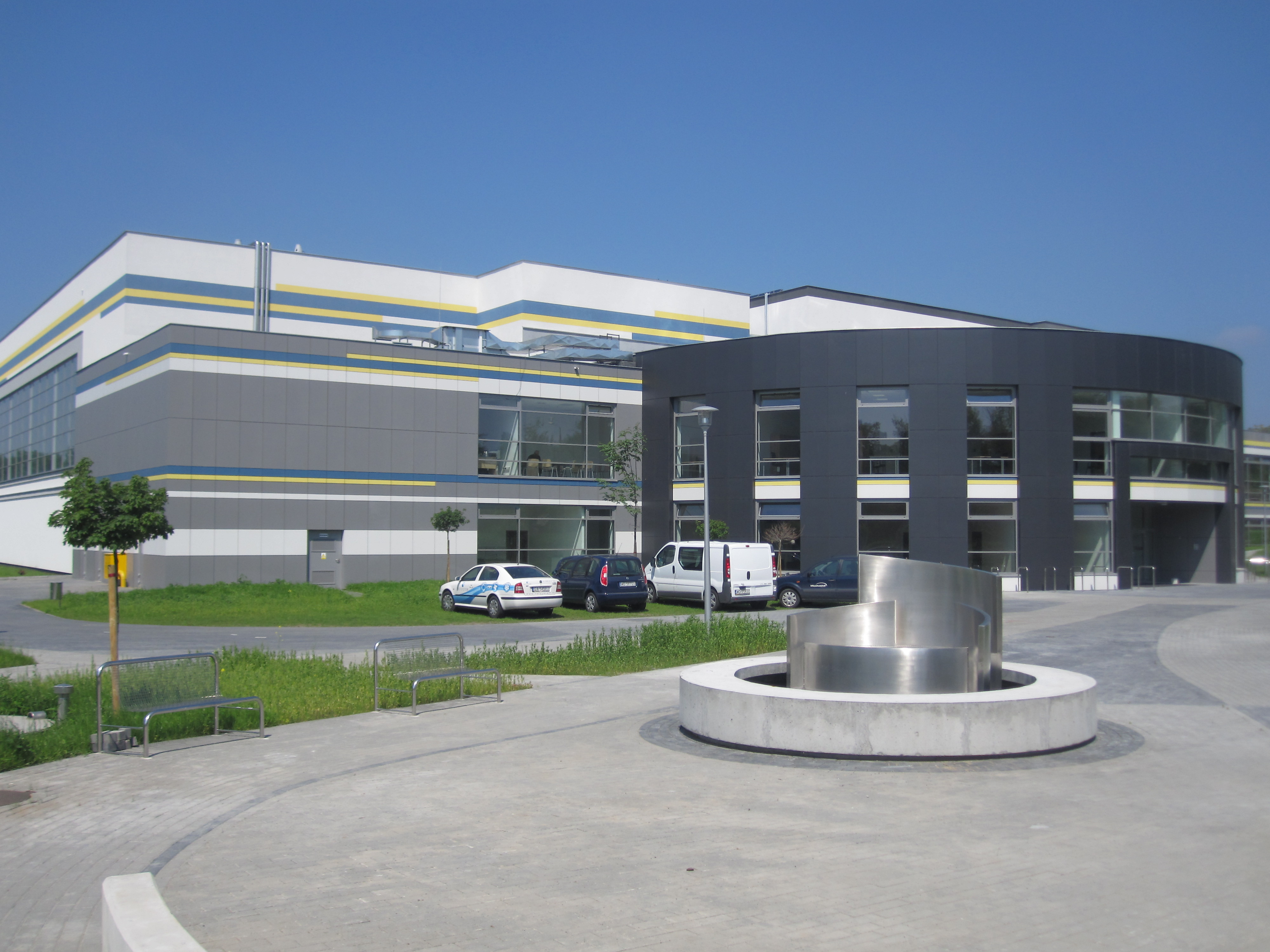 Centrum Sportowe Uniwersytetu Mikołaja Kopernika w Toruniu